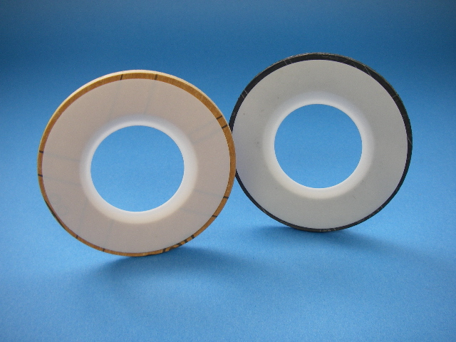 PTFE jacket